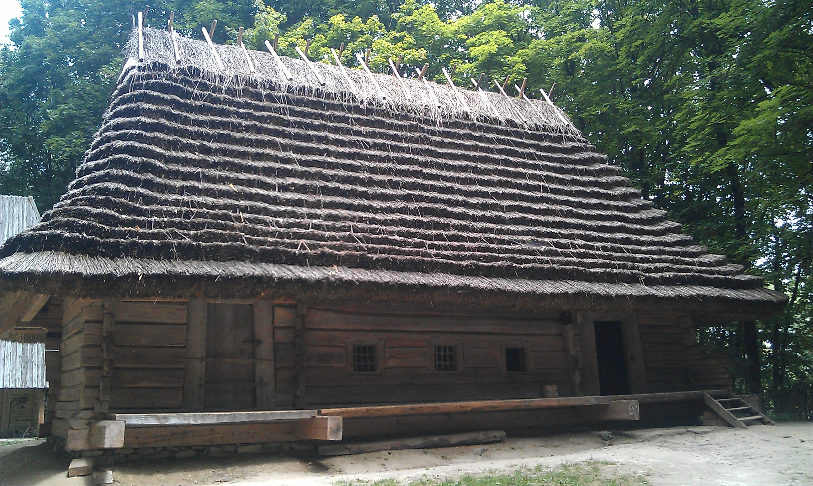 Хата з с.Либохора Турківського р-ну Львівської обл., Львів, вул.Чернеча Гора, 1